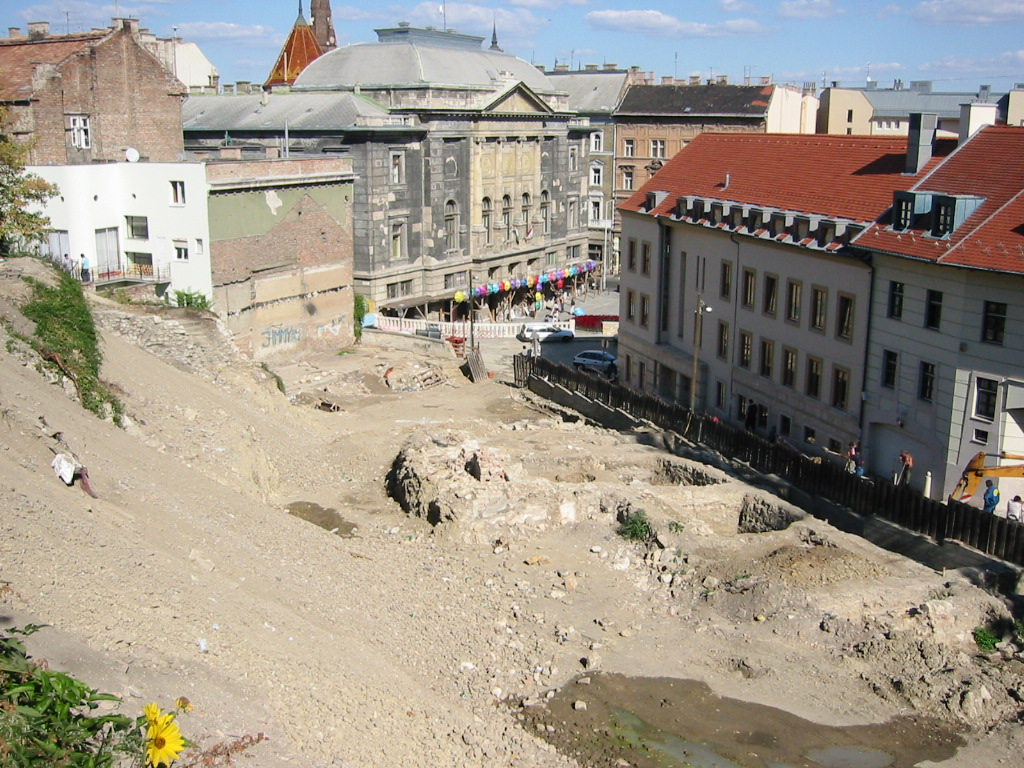 Budai Vigadó This is a photo of a monument in Hungary, Identifier: 12221